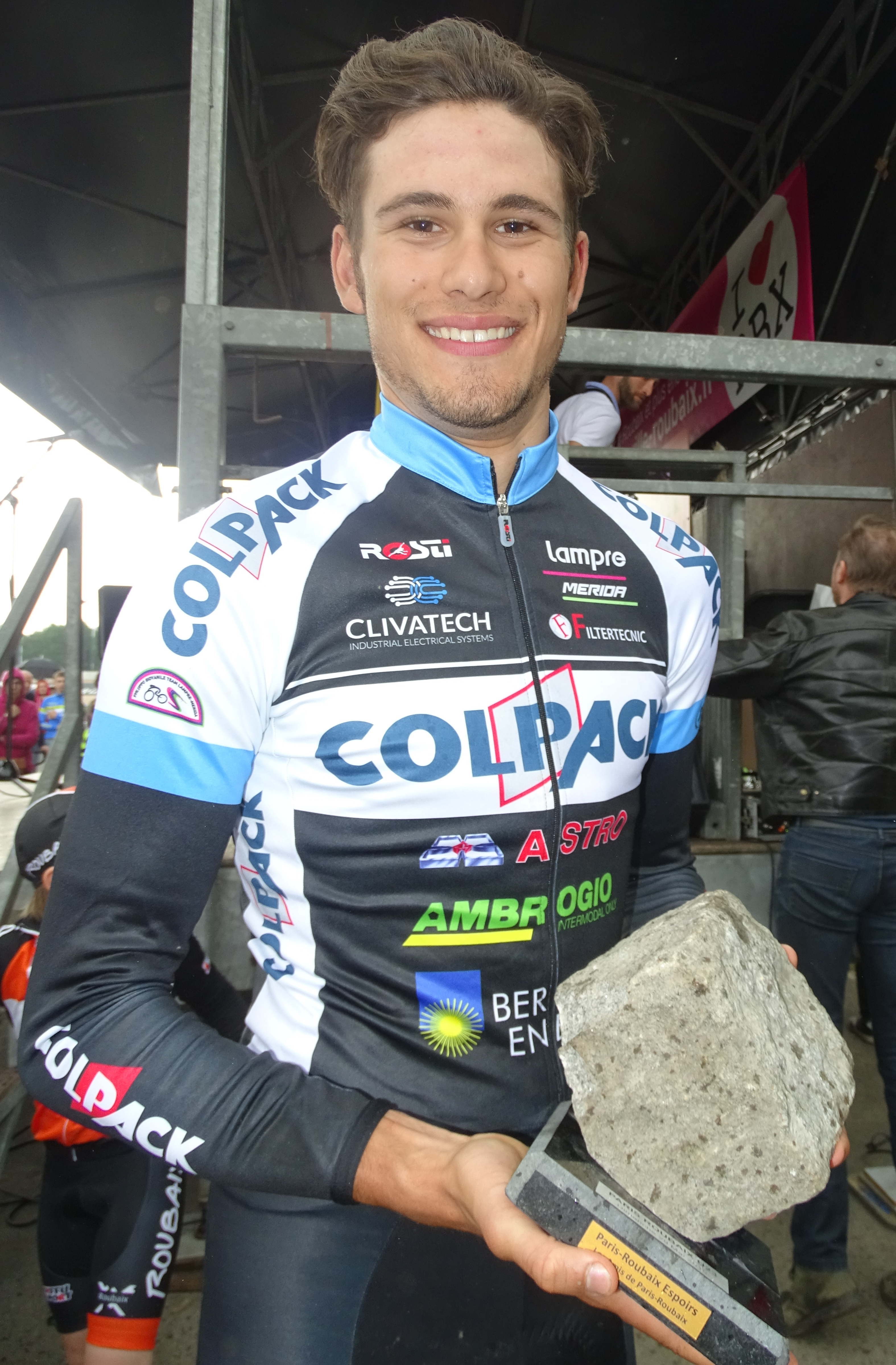 Reportage réalisé le dimanche 29 mai à l'occasion de l'arrivée du Paris-Roubaix espoirs 2016 au vélodrome André-Pétrieux à Roubaix, Nord, Nord-Pas-de-Calais-Picardie, France. Depicted person: Filippo Ganna